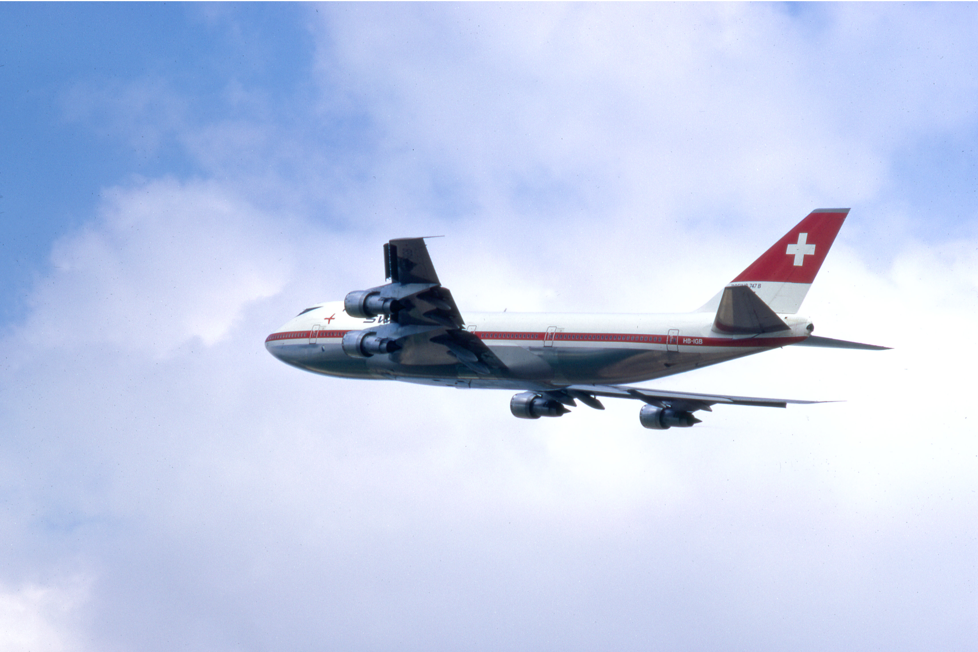 Zurich, 1976